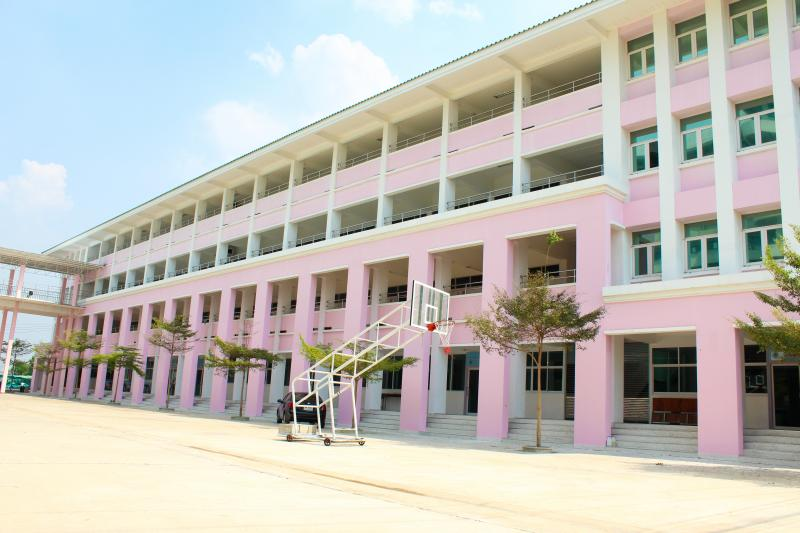 อาคารสิรินธร 3 โรงเรียนสวนกุหลาบวิทยาลัย รังสิต